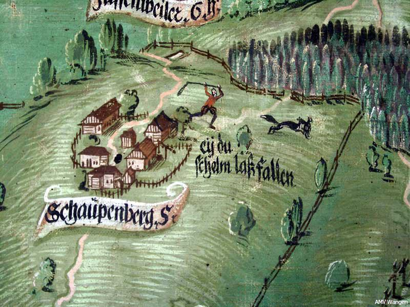 Ein Detail aus der Wangener Landtafel (207 x 290 cm): Bild (Öl auf Leinwand) von Johann Andreas Rauch.